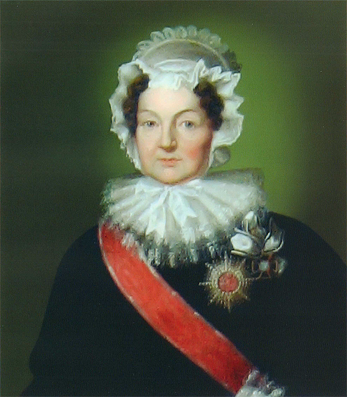 Беларуская (тарашкевіца): Партрэт Людвікі Радзівіл (Ludvika Radzivił) з роду Гогенцолернаў (Hohenzollern). Зь Нясьвіскай партрэтнай галерэі